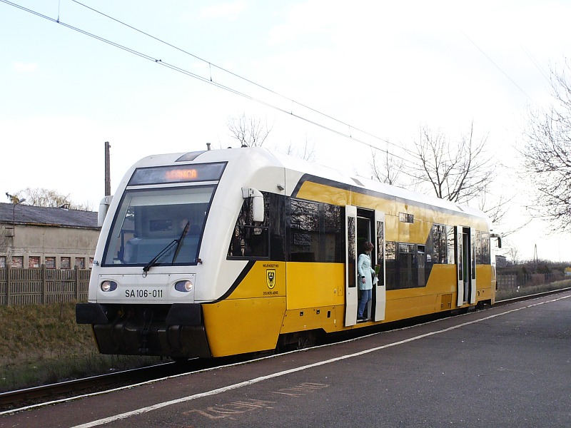 Autobus szynowy SA106 na stacji Legnica Piekary.